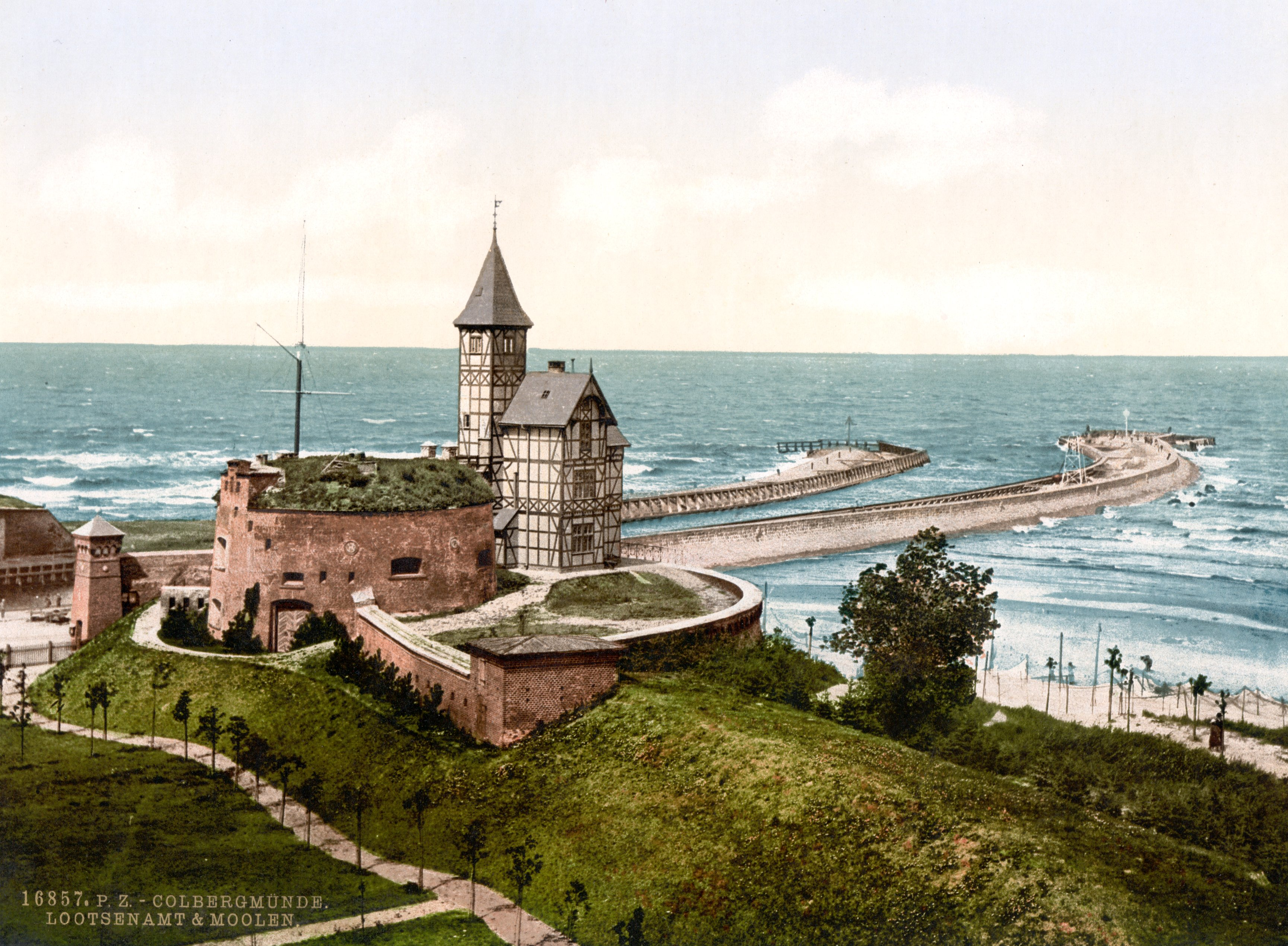 Latarnia morska w Kołobrzegu przed 1909r.